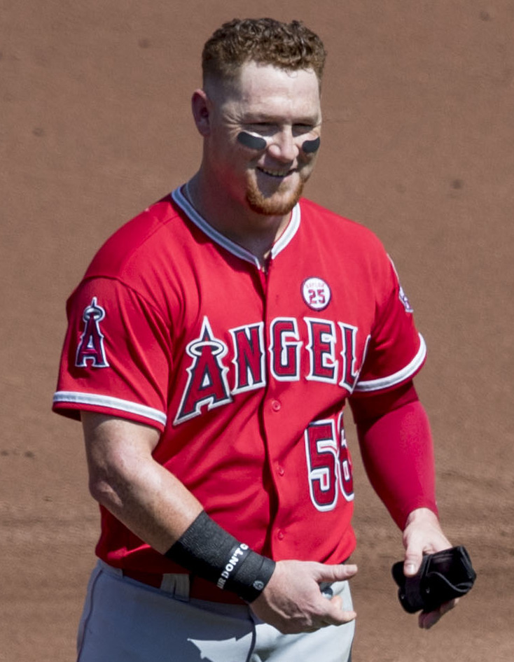 Angels at Orioles 8/20/17